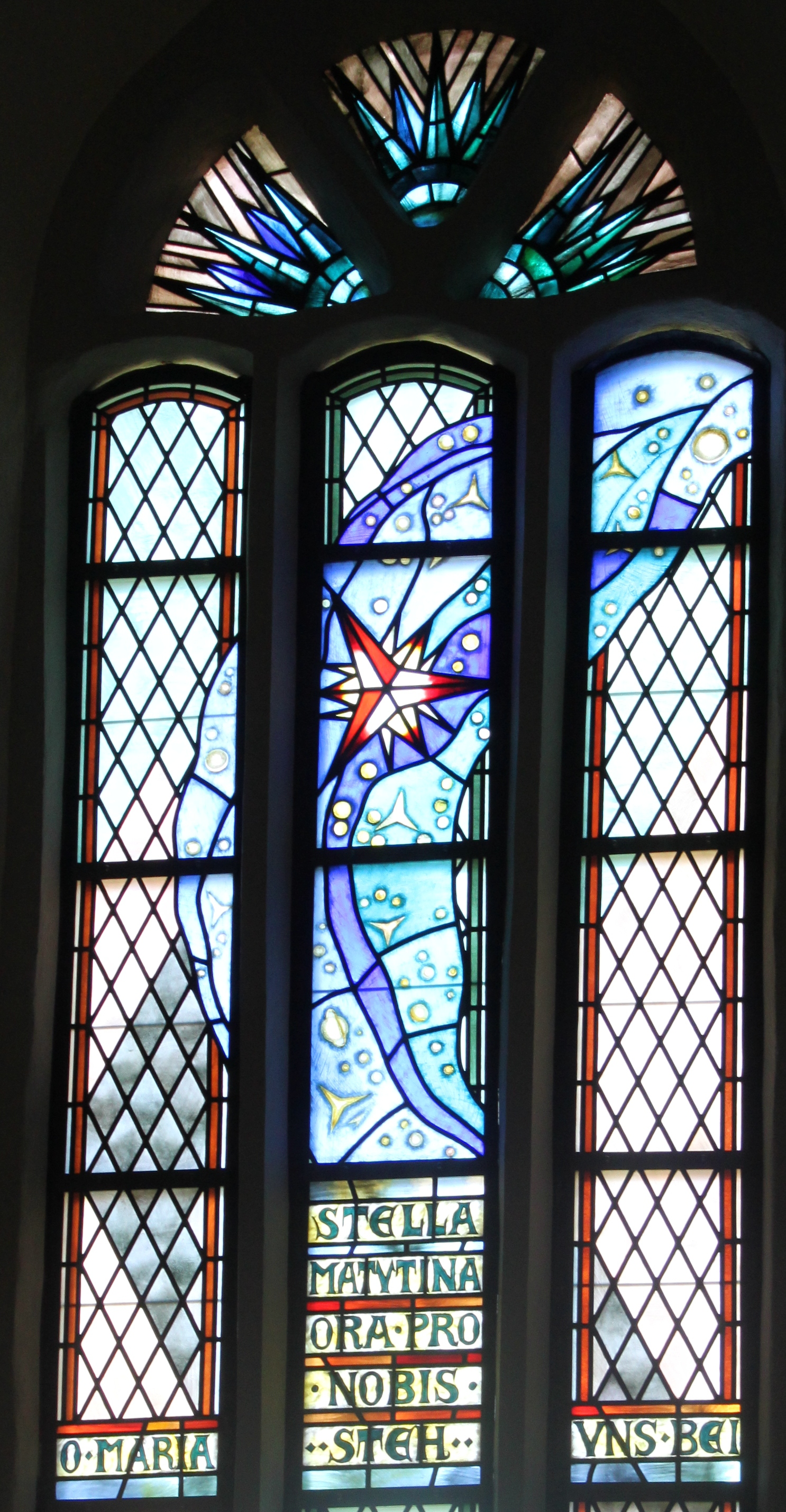 Fenster auf der Nordseite der Pfarrkirche Wittichenau Morgenstern Hornjoserbsce: Wokno při sewjernym boku Kulowskeje wosadneje cyrkwje